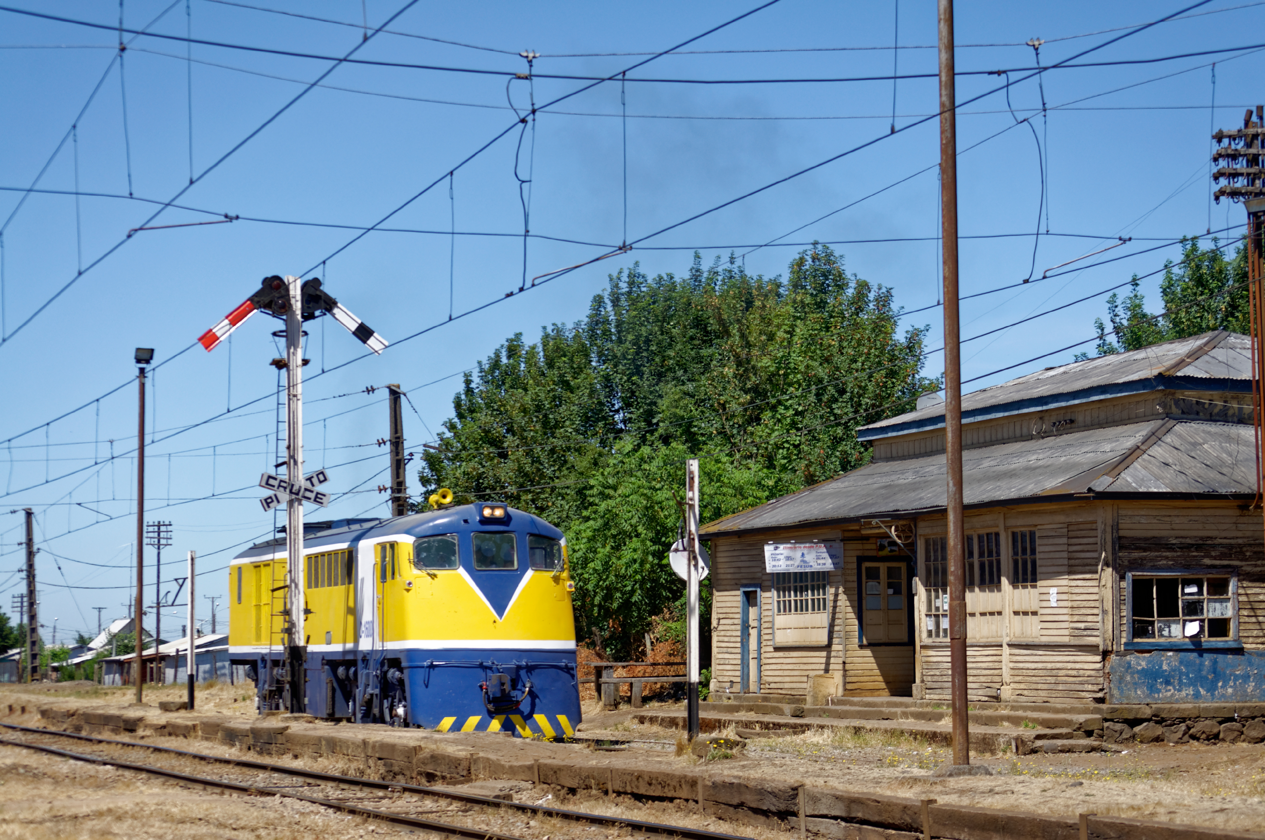 Dispuesta a seguir rumbo a Victoria, la D16005 a llenar estanques para en la tarde salir rumbo a Santiago con el servicio Nocturno TEMUCO - SANTIAGO. PUA, Enero 2016